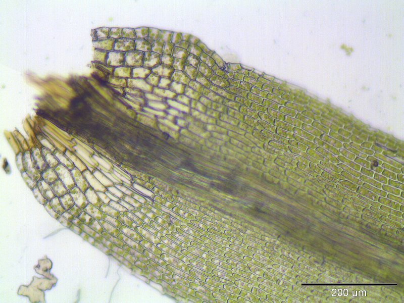 Bleiches Lippenbechermoos (Dicranum montanum), Blattbasis, Vergrößerung: 125x